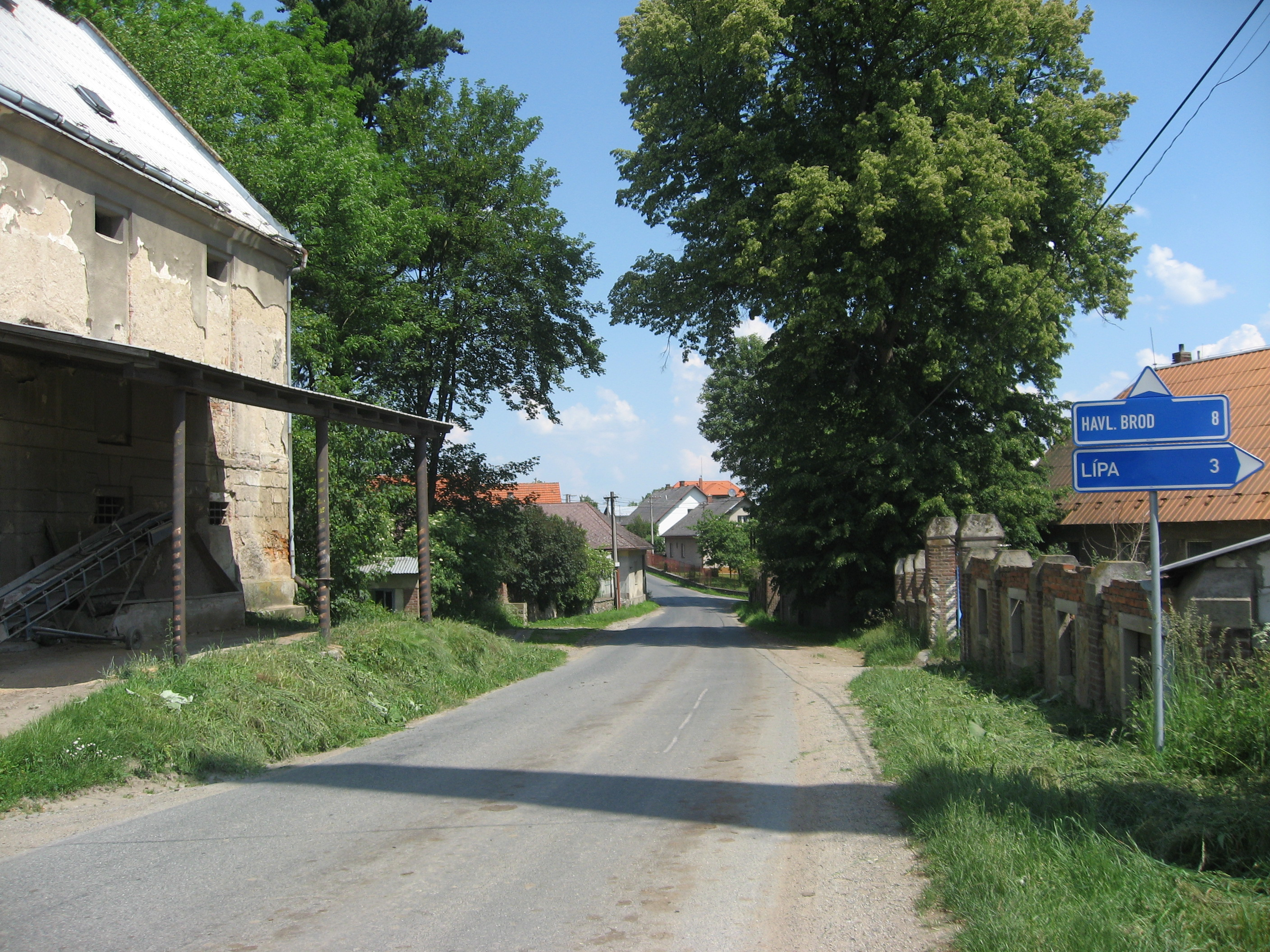 Květinov